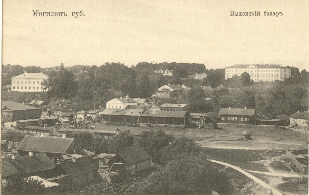 Беларуская (тарашкевіца): Магілёў (Mahiloŭ), Быхаўскі Рынак (Bychaŭski Rynak)